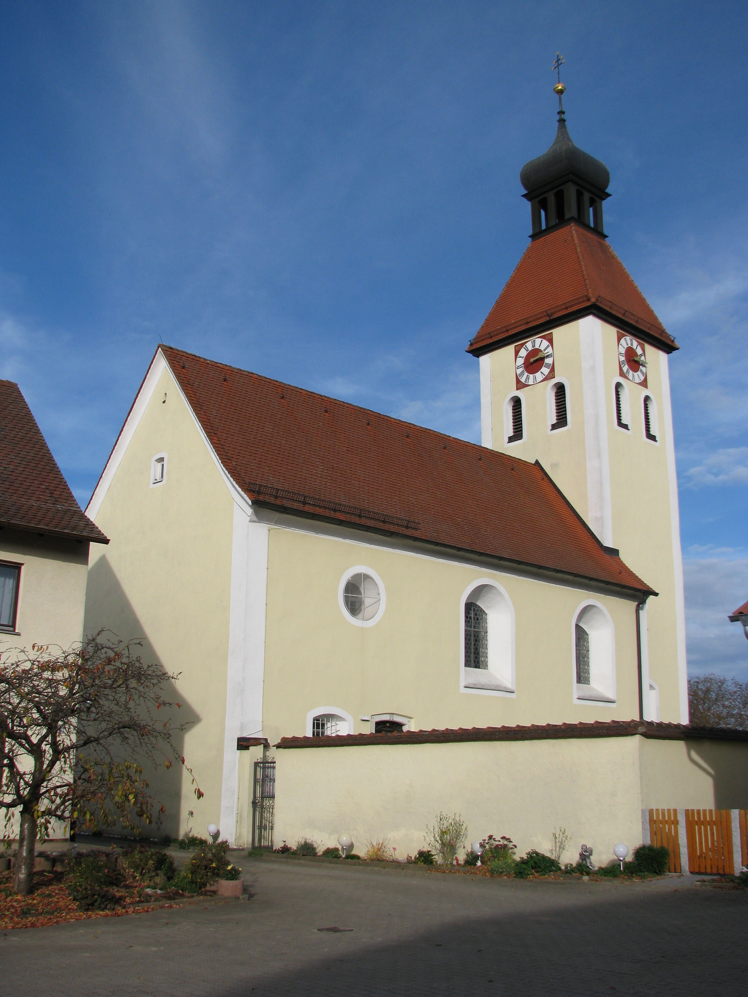 Österberg, Ortsteil von Greding im mittelfränkischen Landkreis Roth in Bayern